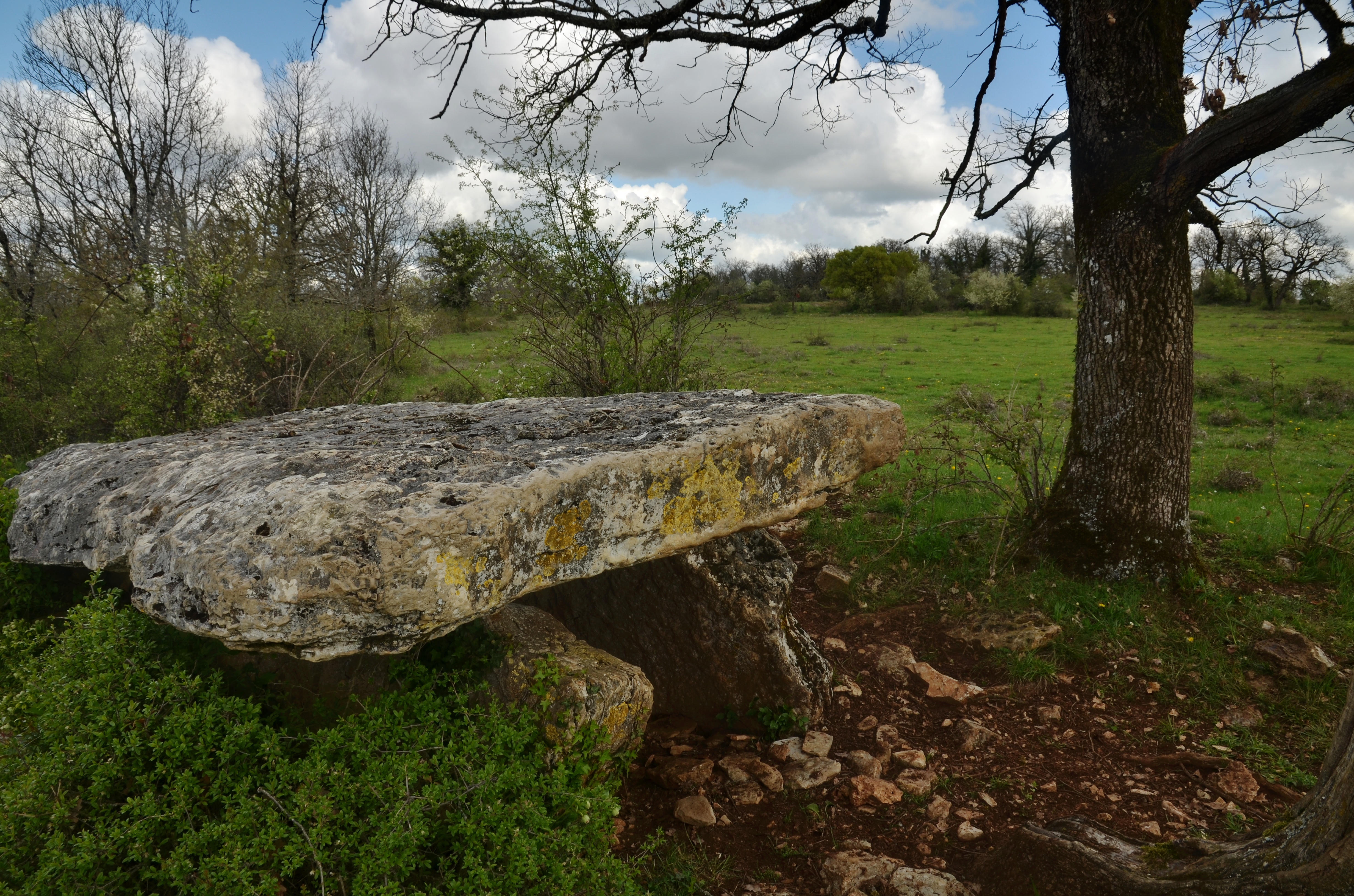 Dolmen du Champ de Belair dans le Hameau de Mons à Assier, Lot, France (1 parmi les 4 présents sur le site)